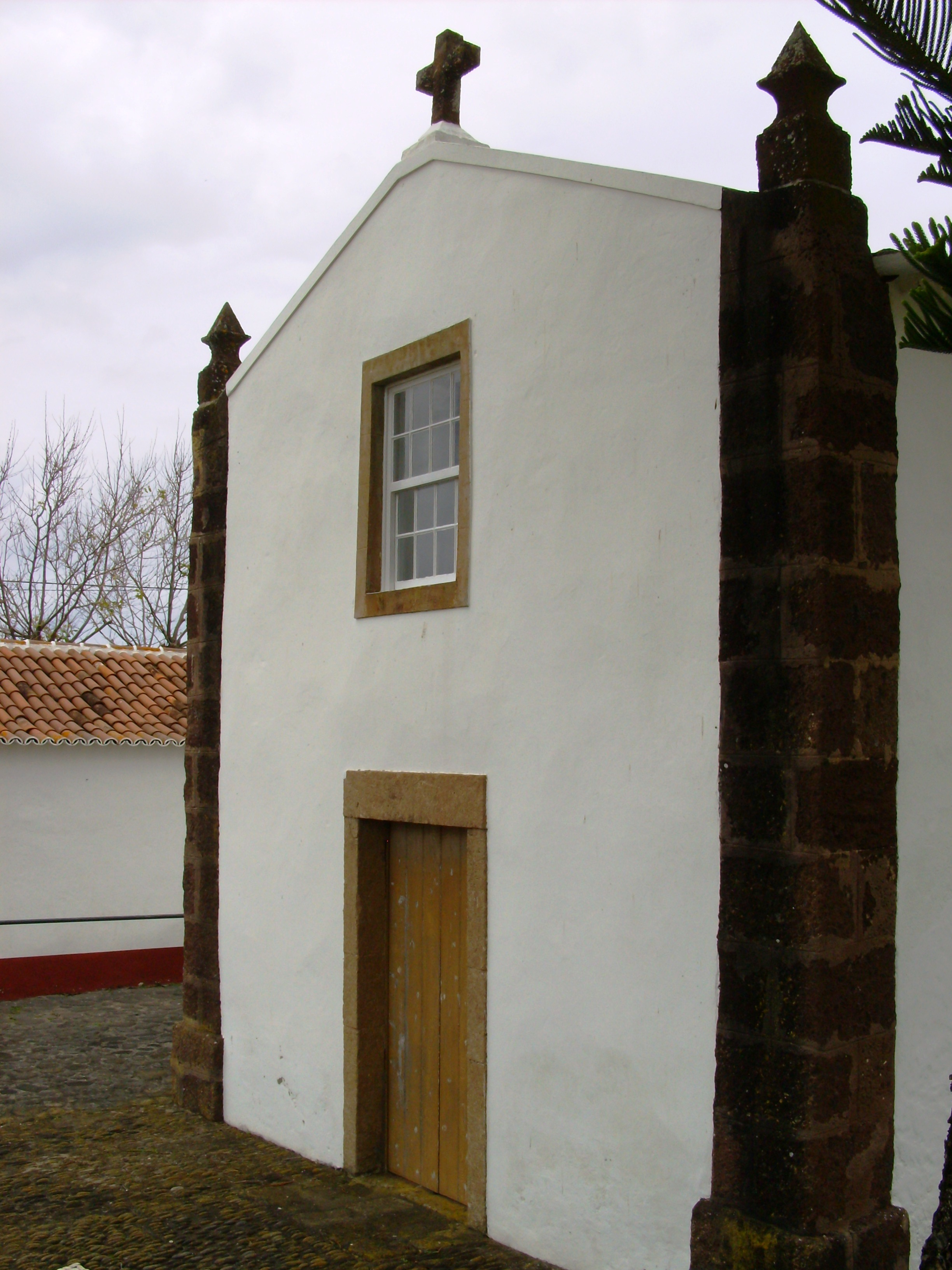 Ermida de Nossa Senhora dos Anjos, Ilha de Santa Maria (Açores), Portugal.